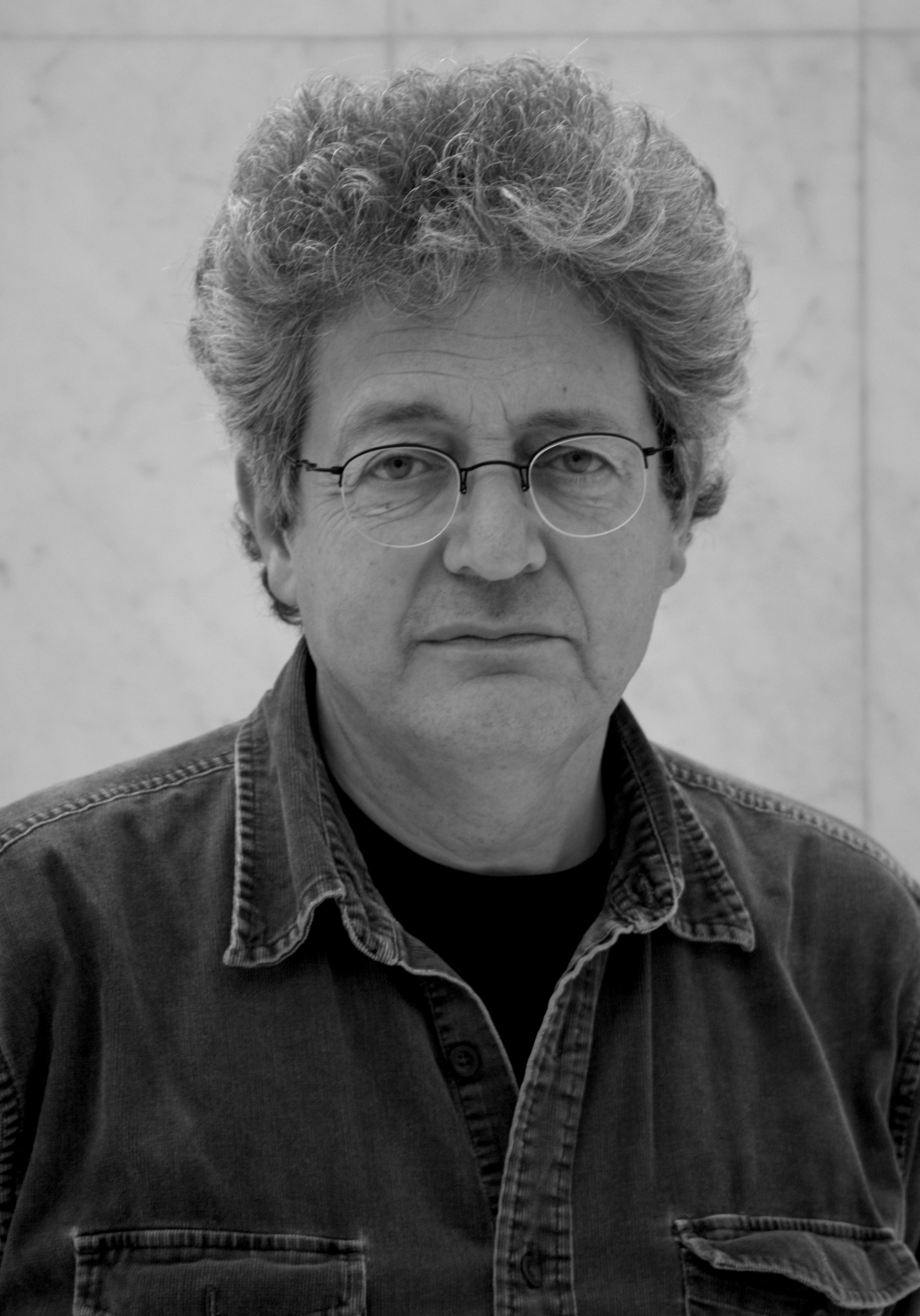 Georges Bensoussan est un historien français né en 1952 au Maroc, d'où est originaire sa famille. Spécialiste d'histoire juive européenne, ses travaux sont consacrés à l'antisémitisme, à la Shoah, au sionisme et aux problèmes de la mémoire. Il est rédacteur en chef de la Revue d'histoire de la Shoah et responsable éditorial au Mémorial de la Shoah (Paris).